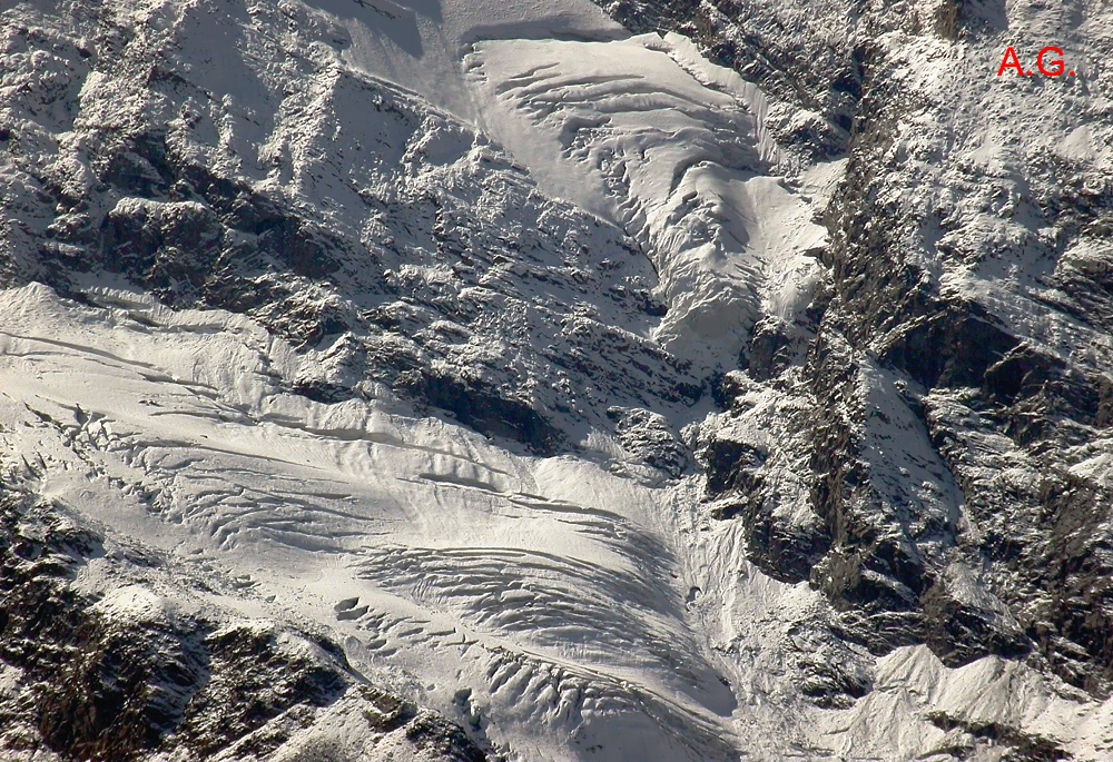 Il Ghiacciaio del Gran Crou - Alpi Graie - Italy